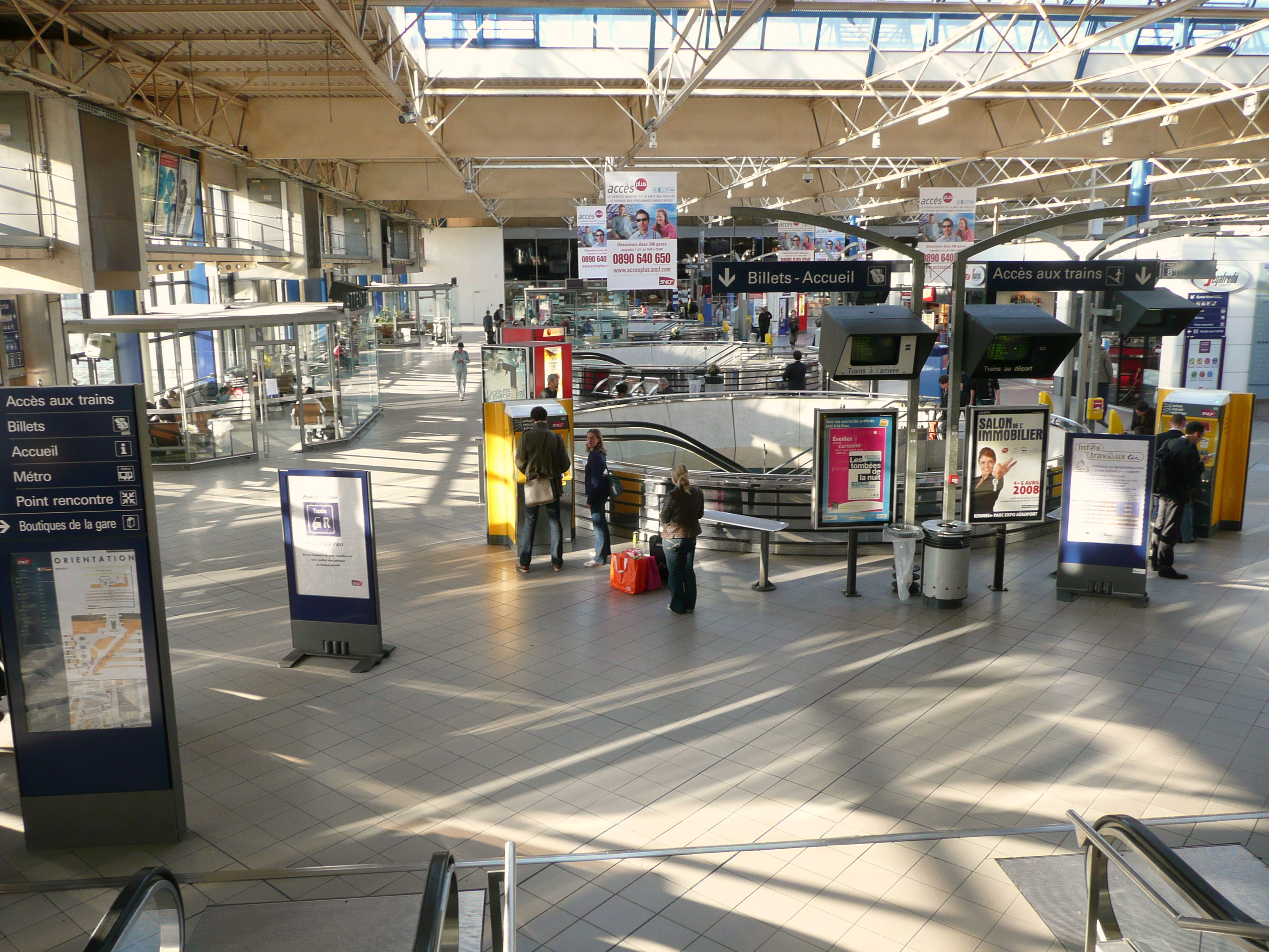 Gare de Rennes (France) : Hall de la gare